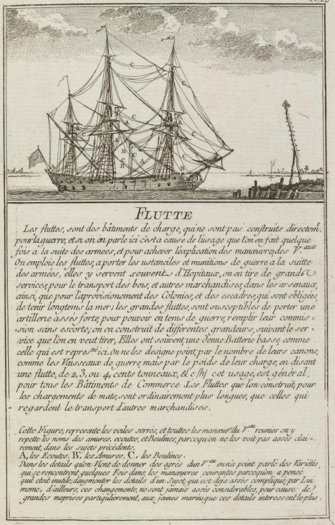 Représentation d'un flûte militaire et de son utilité tirée de Marine militaire, ou Recueil des différents vaisseaux qui servent à la guerre, suivis des manœuvres qui ont le plus de rapport au combat ainsi qu'à l'attaque et la défense des ports par N. Ozanne.